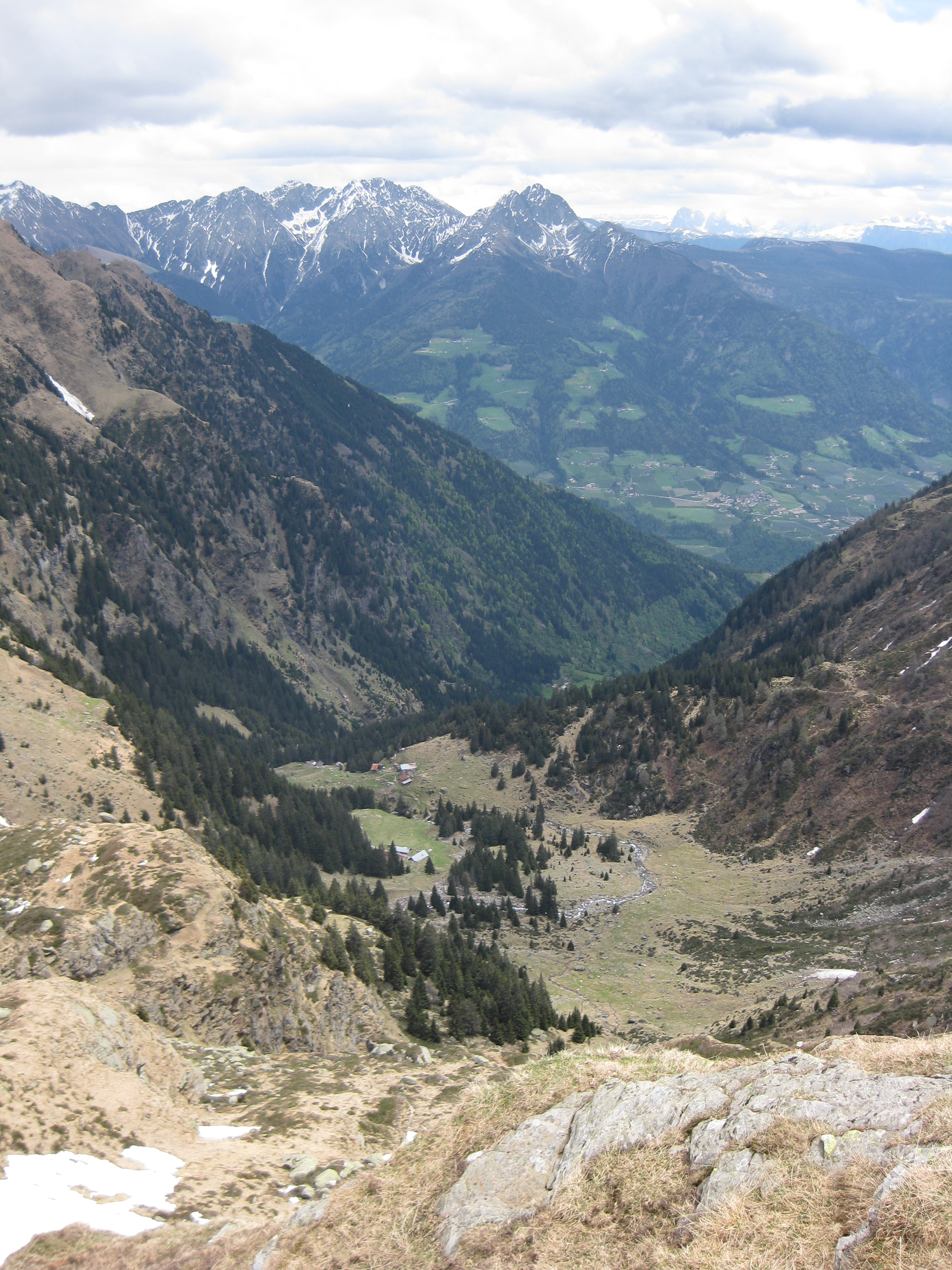 Das Spronser Tal in Südtirol mit Blickrichtung talauswärts - im Hintergrund der Ifinger, ein Gipfel der Sarntaler Alpen